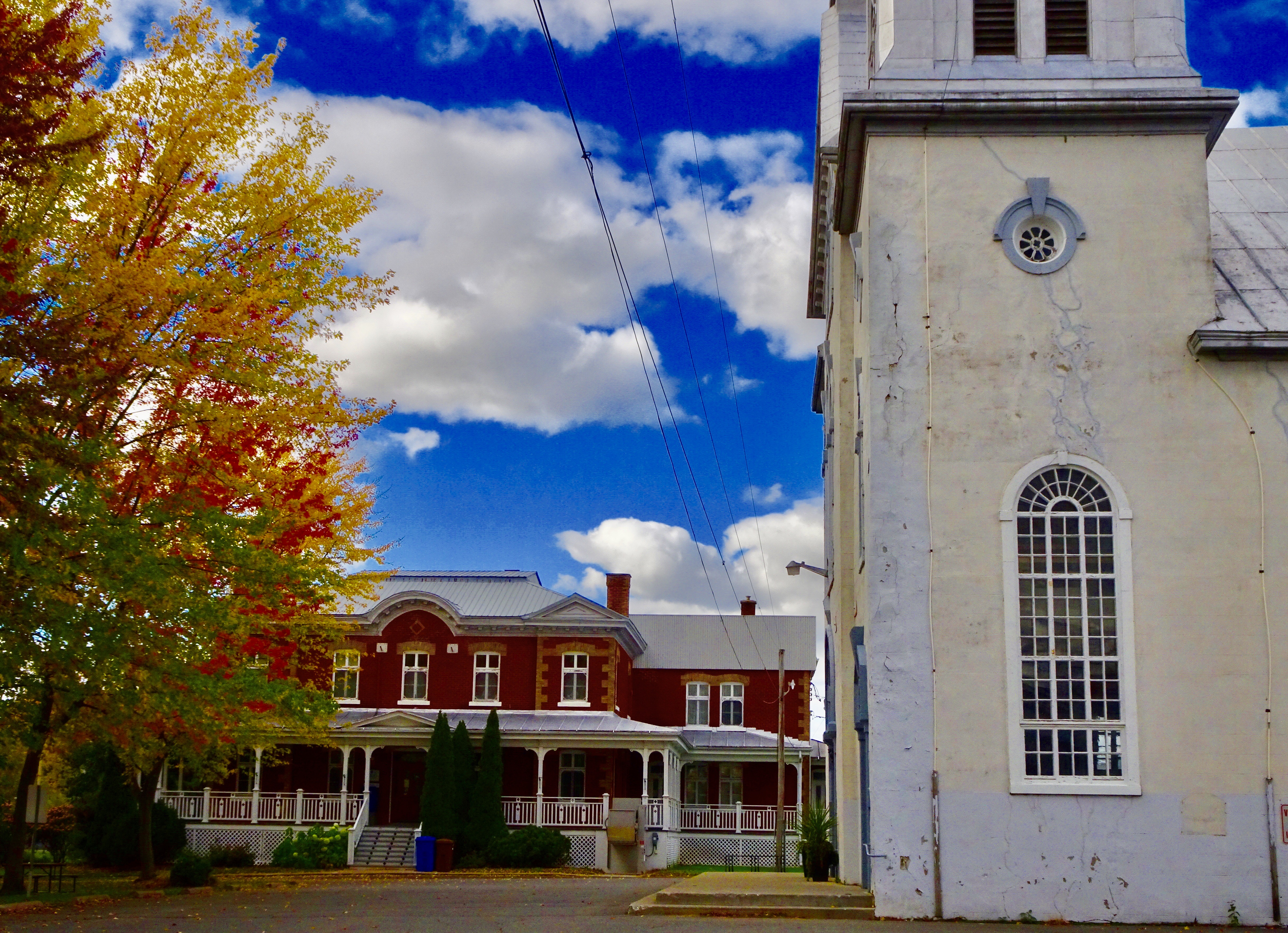 St-David, église et bibliothèque